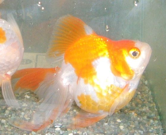 ryukin(goldfish)